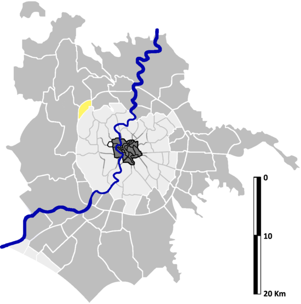 Ottavia